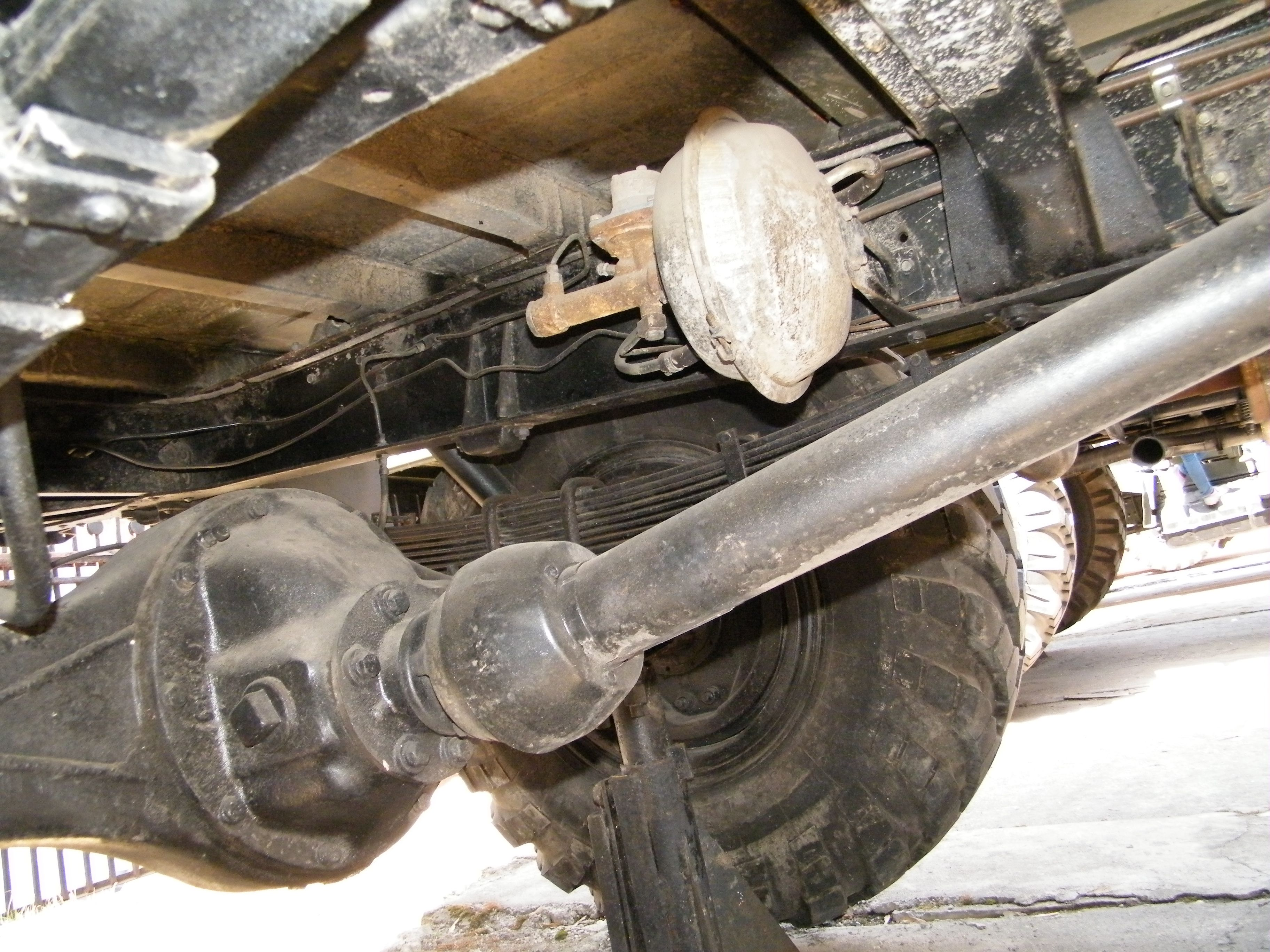 Газ-66 снизу